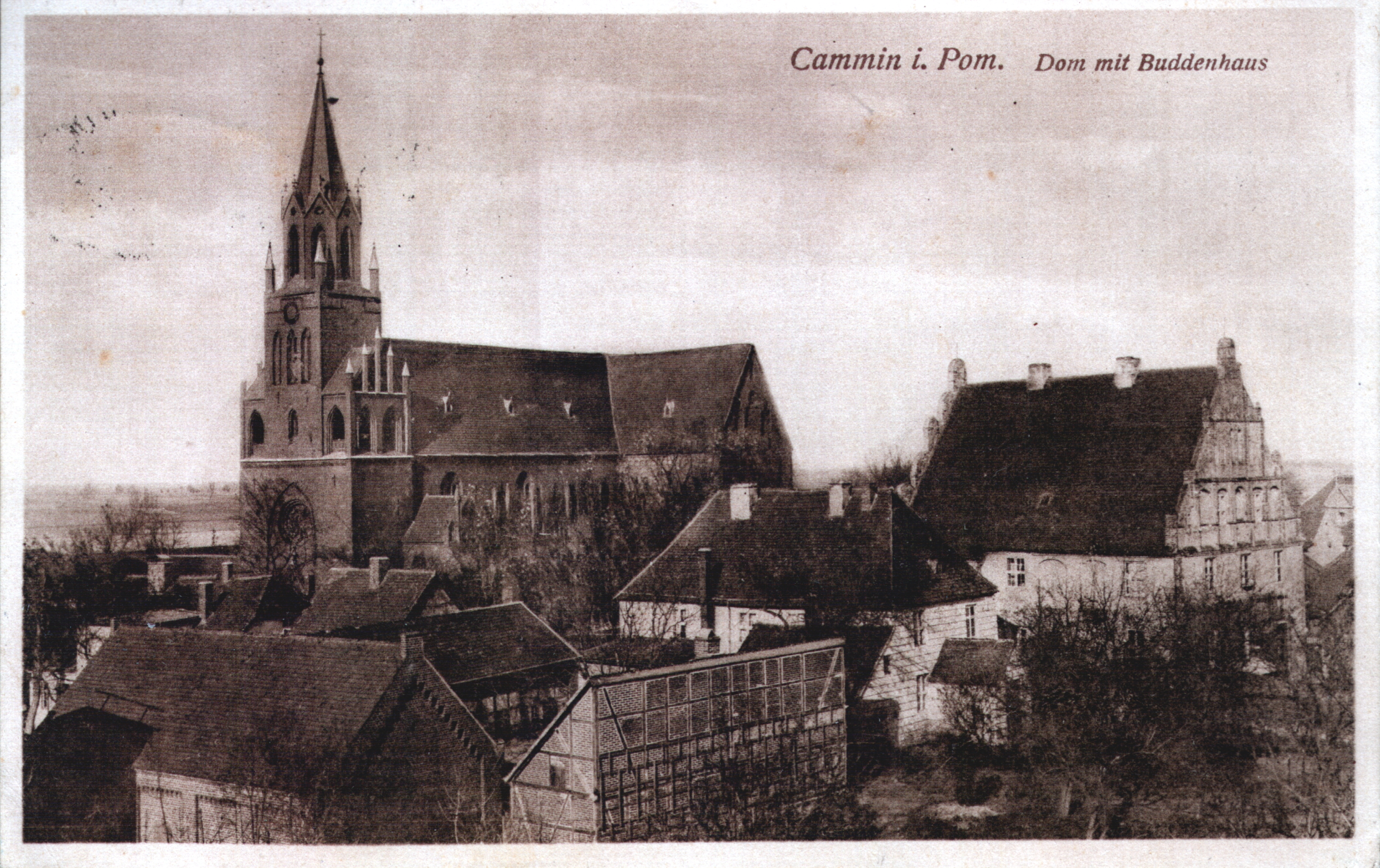 Widok na Katedrę św. Jana Chrzciciela w Kamieniu Pomorskim. Widokówka z roku 1933.